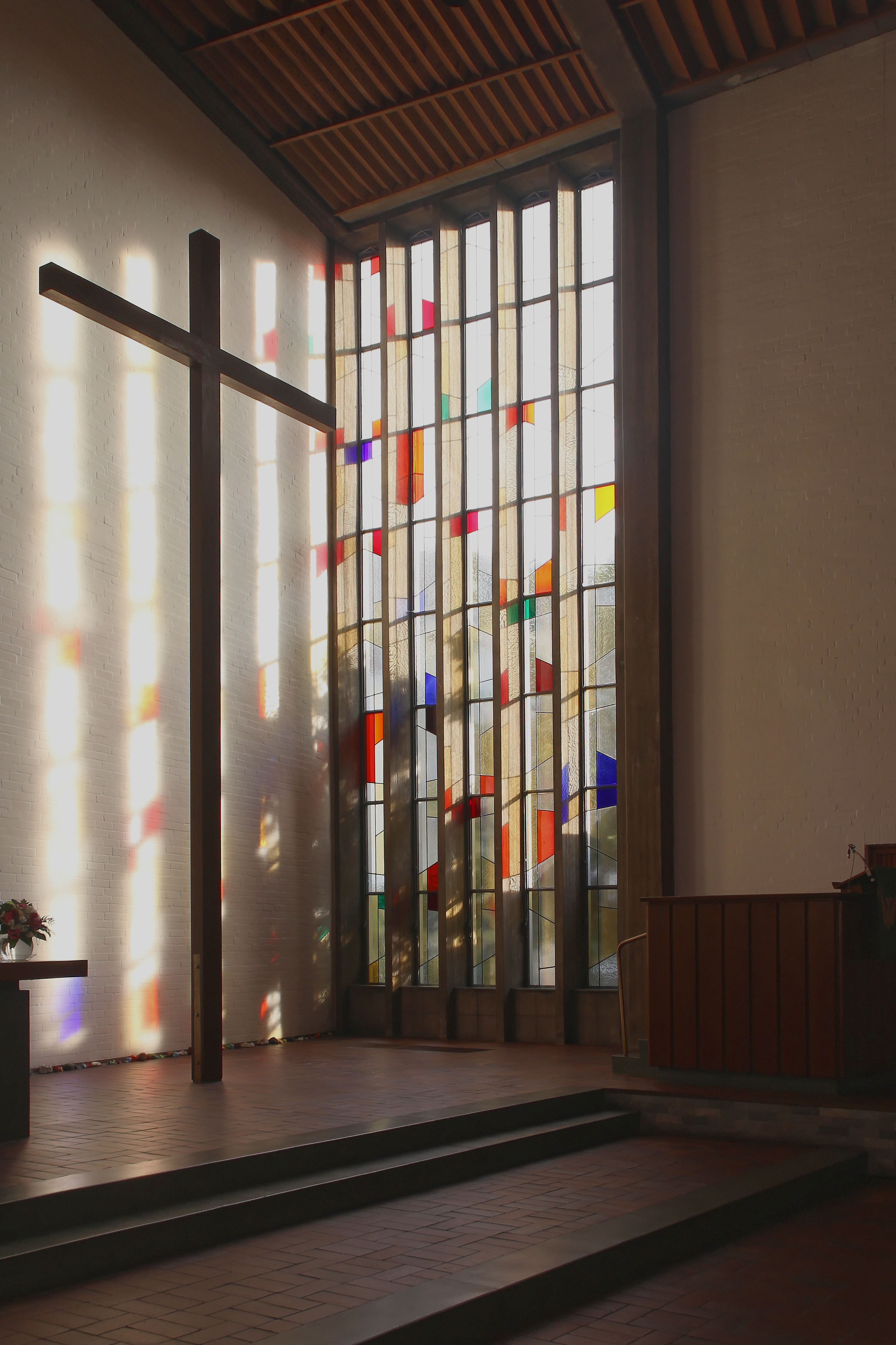 Hamburg-Harburg, St. Johannis Kirche, Ostfenster This is a photograph of an architectural monument.